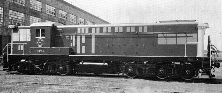 Baldwin AS616 compradas pela EFCB